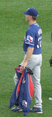 Ron Mahay